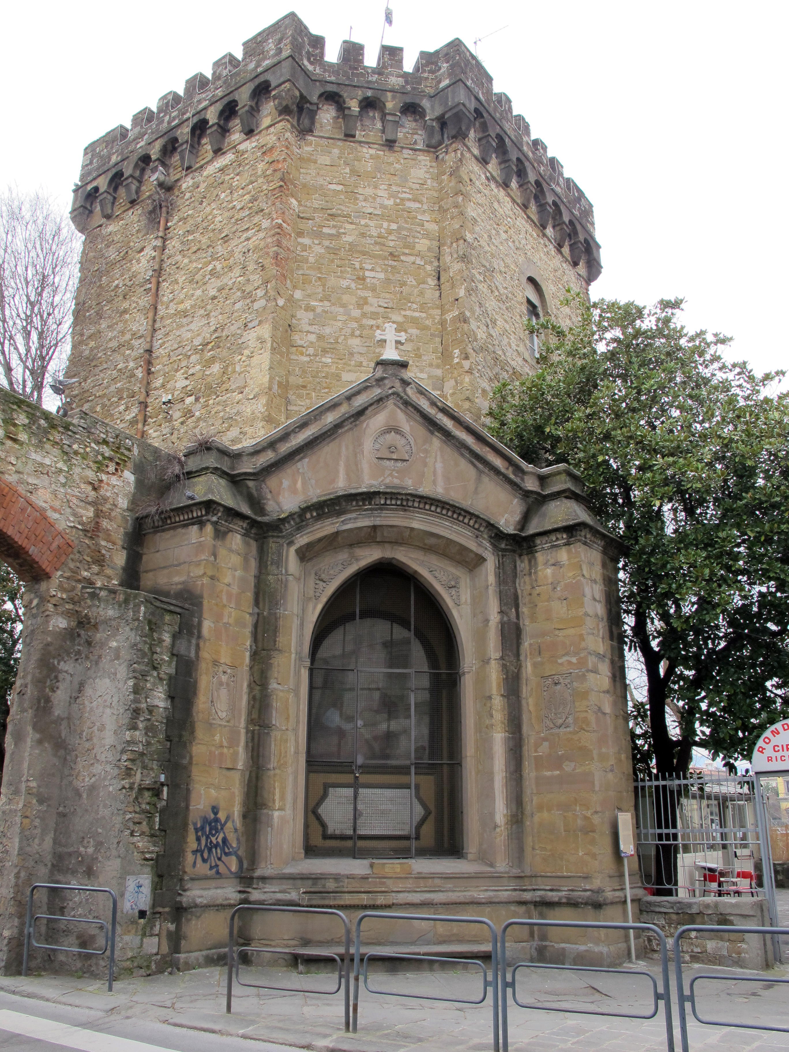 Torrino di s. rosa